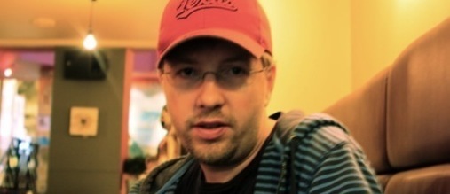 Roar A. Klever Bøye